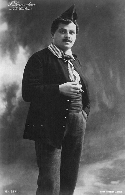 Torsten Lennartsson